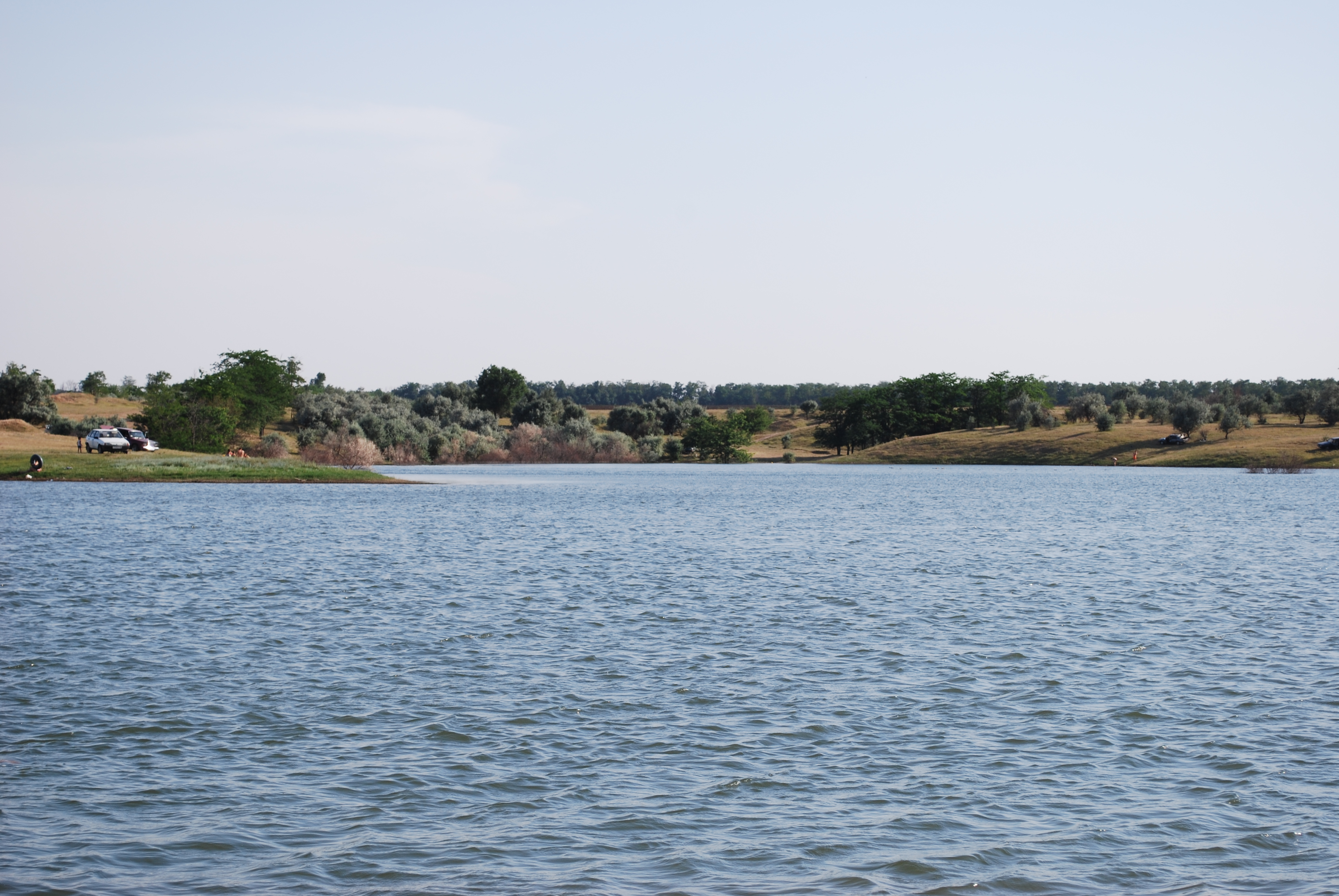 Фотография БСК в поселке Горном